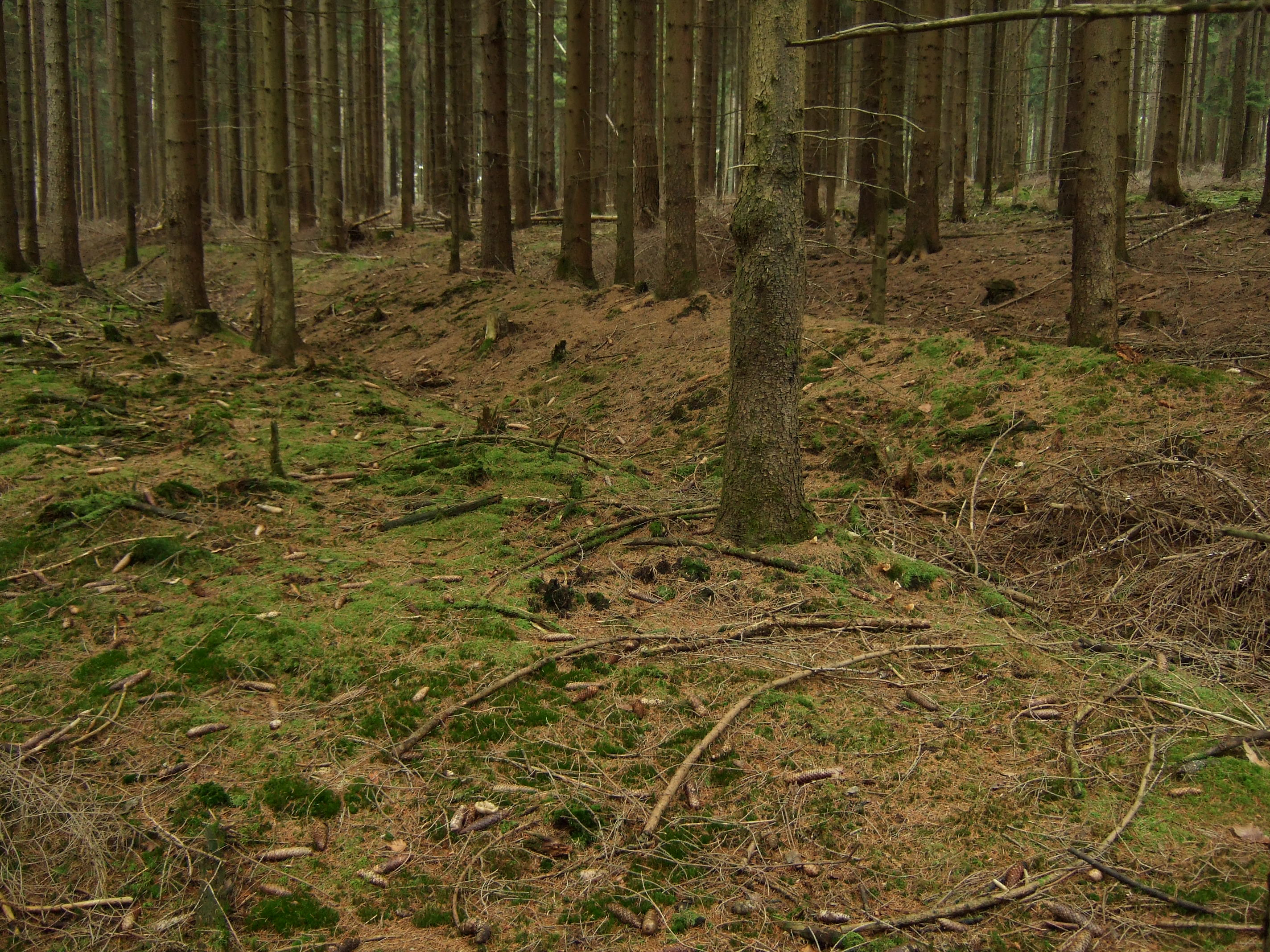 Überreste der Birkenhainer Landstraße im Spessart bei der Gemeinde Wiesen. Typisch für Altstraßen sind hier die Reste mehrerer nebeneinander bestehender Hohlwege zu sehen, die im Laufe der Jahrhunderte benutzt worden sind.